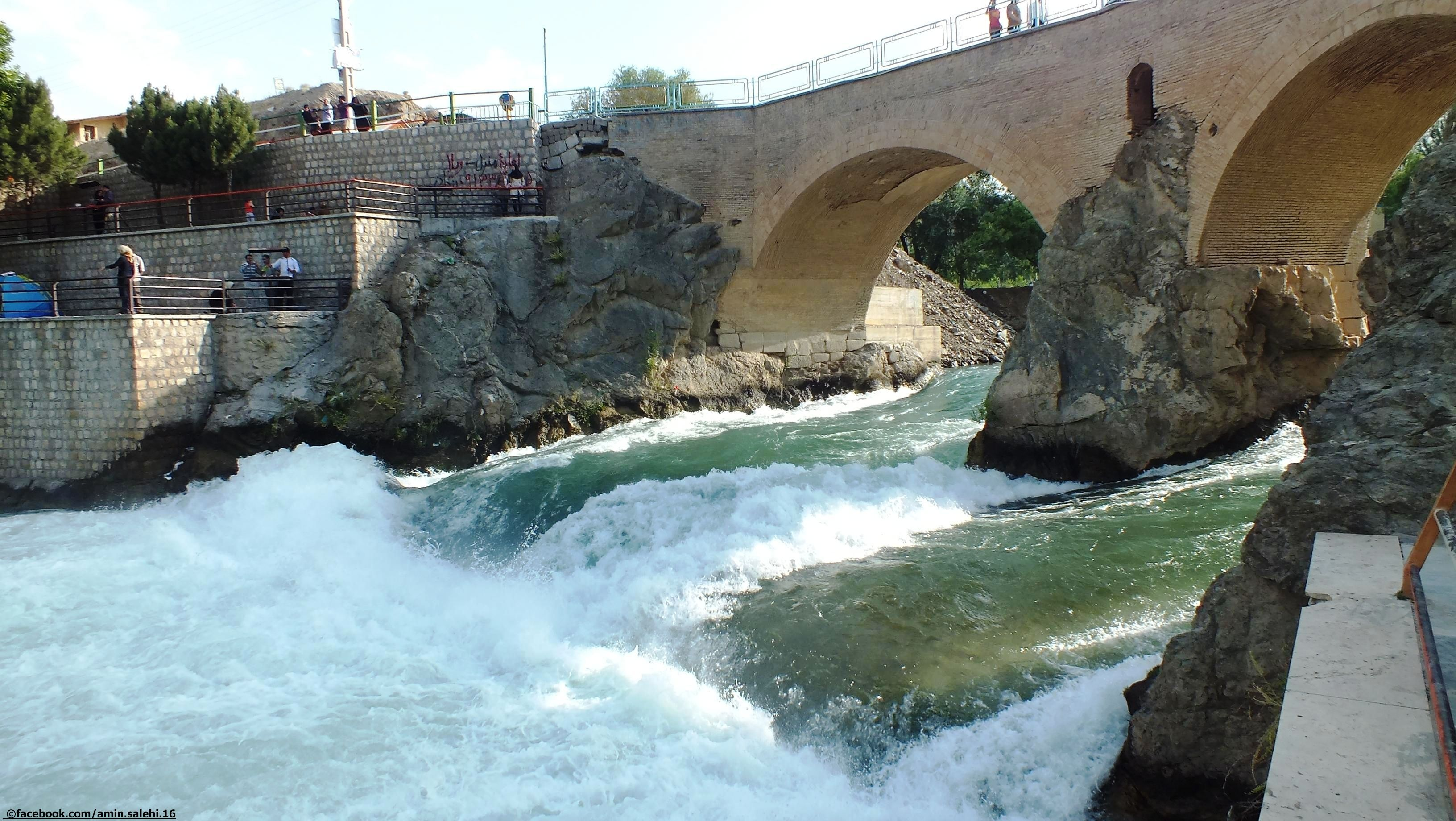 پل زمانخان - تابستان 1392